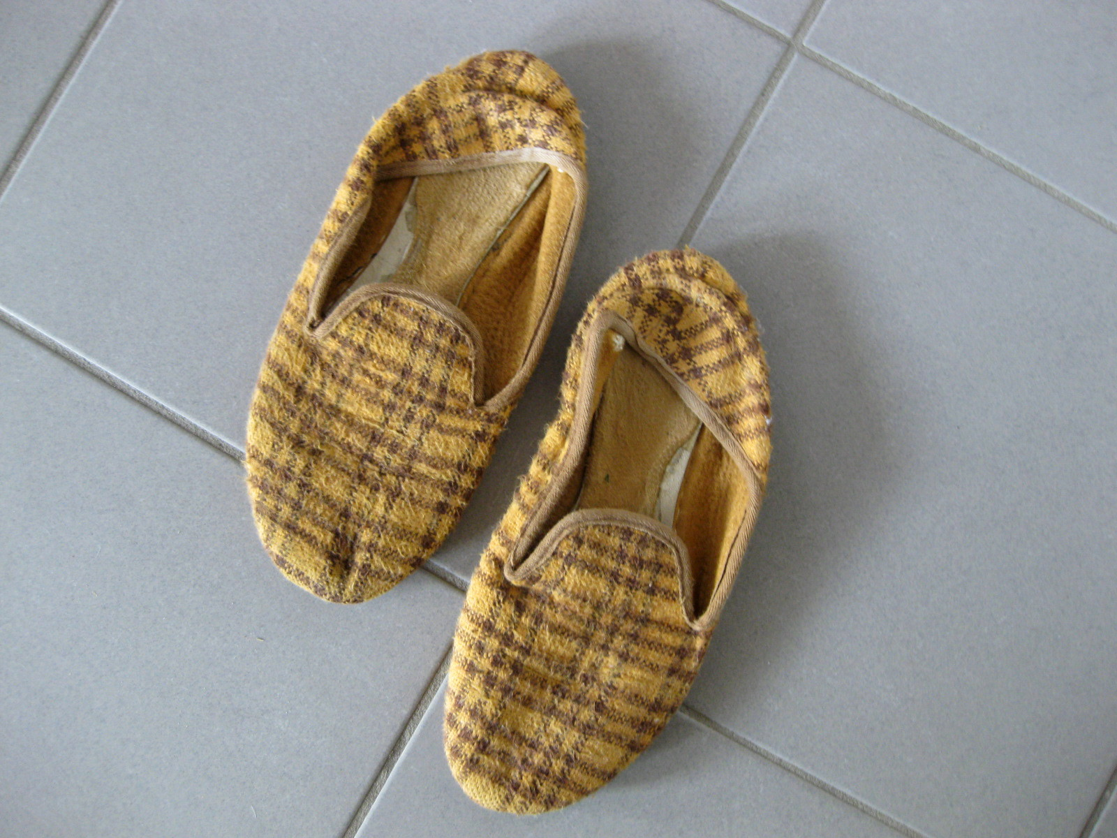 Hausschuhe aus der DDR, dieses Paar wurde um 1974 hergestellt, wegen der meist heruntergetretenen Fersenkappen umgangssprachlich (im Raum Sachsen?) als Niedertreter bezeichnet. Die Ausfuhr von Schuhen aus der DDR war Privatpersonen untersagt; dieses Paar wurde dennoch aus der DDR aus- und in die Bundesrepublik Deutschland eingeführt